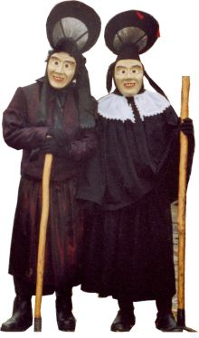 Alte Empfinger Fasnetshexe